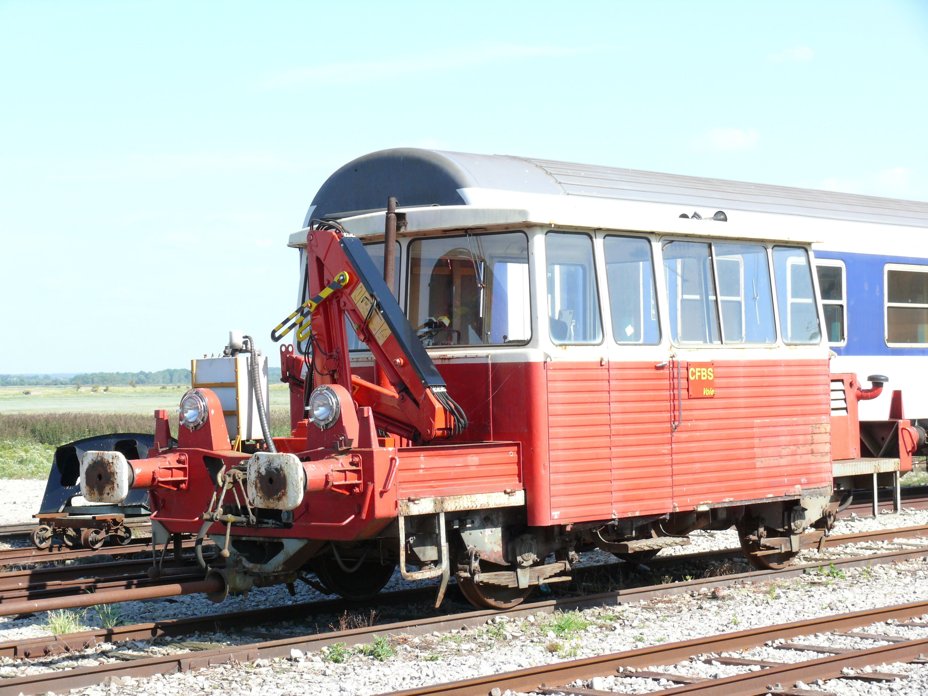 draisine CIMT Lorraine de type DU 65 n°046 au dépôt de Saint-Valery Canal